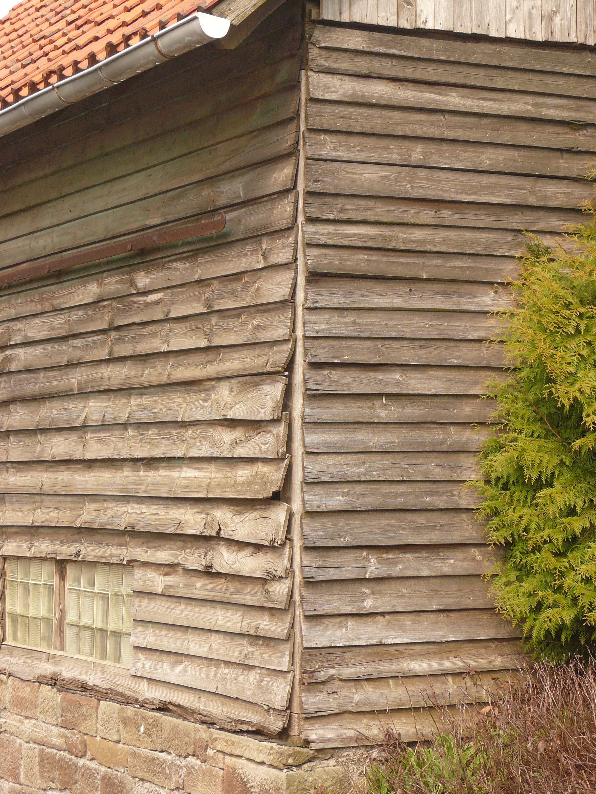 Alte vergraute Stülpschalung an einem Schuppen. An der offenen Ecke ist die Herstellungsweise einer einfachen Stülpschalung zu erkennen, hier mit teilweise verformten einfachen Brettern und ohne Tropfnase. Das unterste Brett steht auf der Horizontalsperre auf und ist durch Feuchtigkeit geschädigt